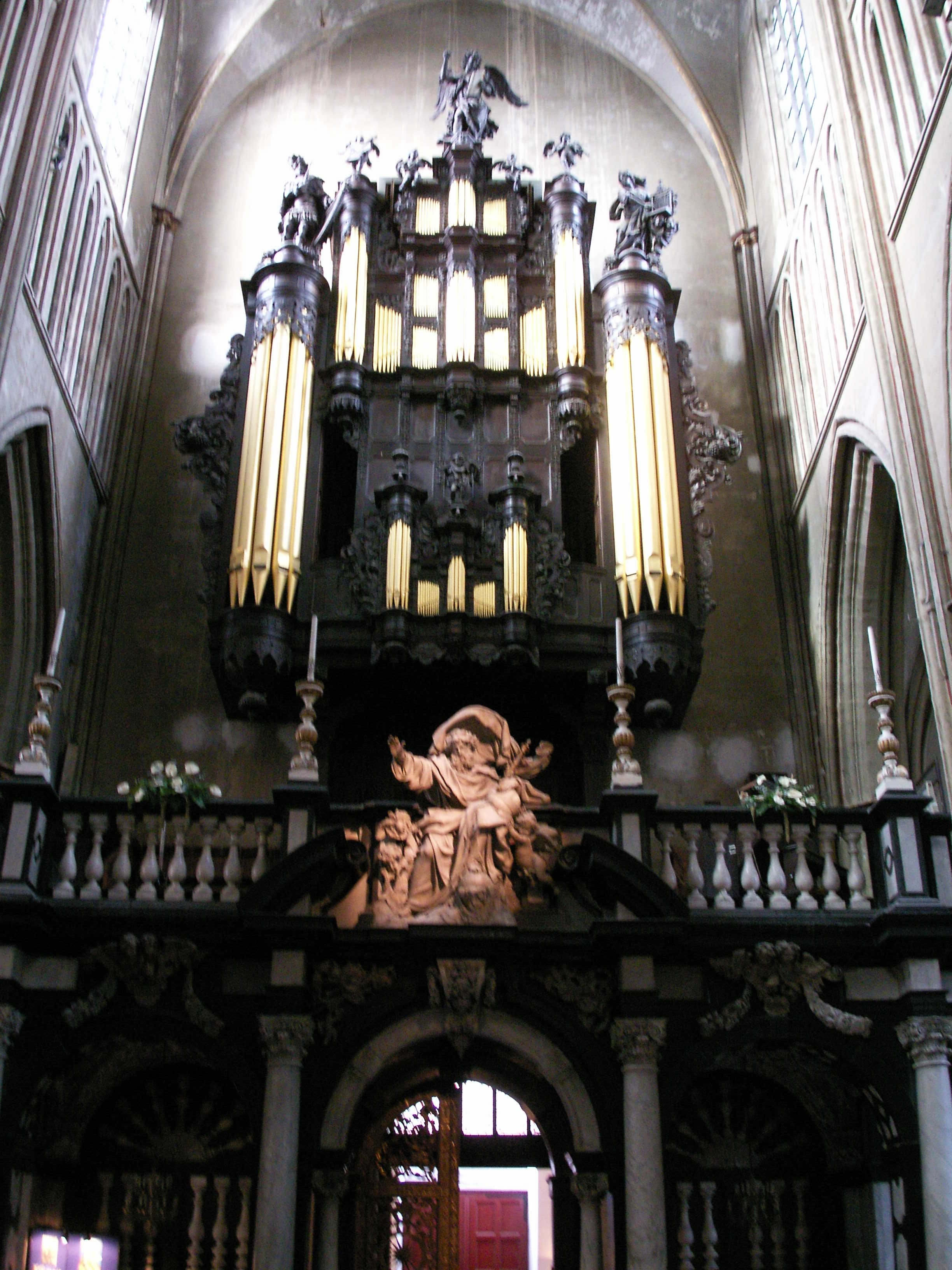 en la Catedral de San Salvador, Brujas, Bélgica.